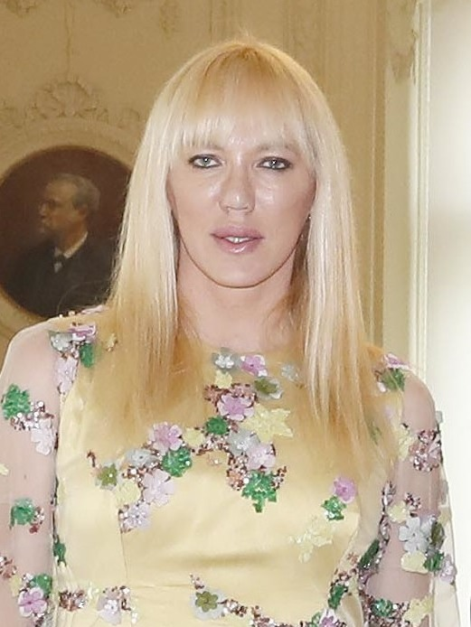 Nuria López, Mayte Gallego, Elena García Armada, Futsi Atlético Navalcarnero, Topacio Fresh, Ángeles Sánchez y Ana Isabel Pereda son mujeres extraordinarias y reciben los ‘Reconocimientos 8 de marzo’ por lo que hacen y lo que representan. ¡Enhorabuena a todas!